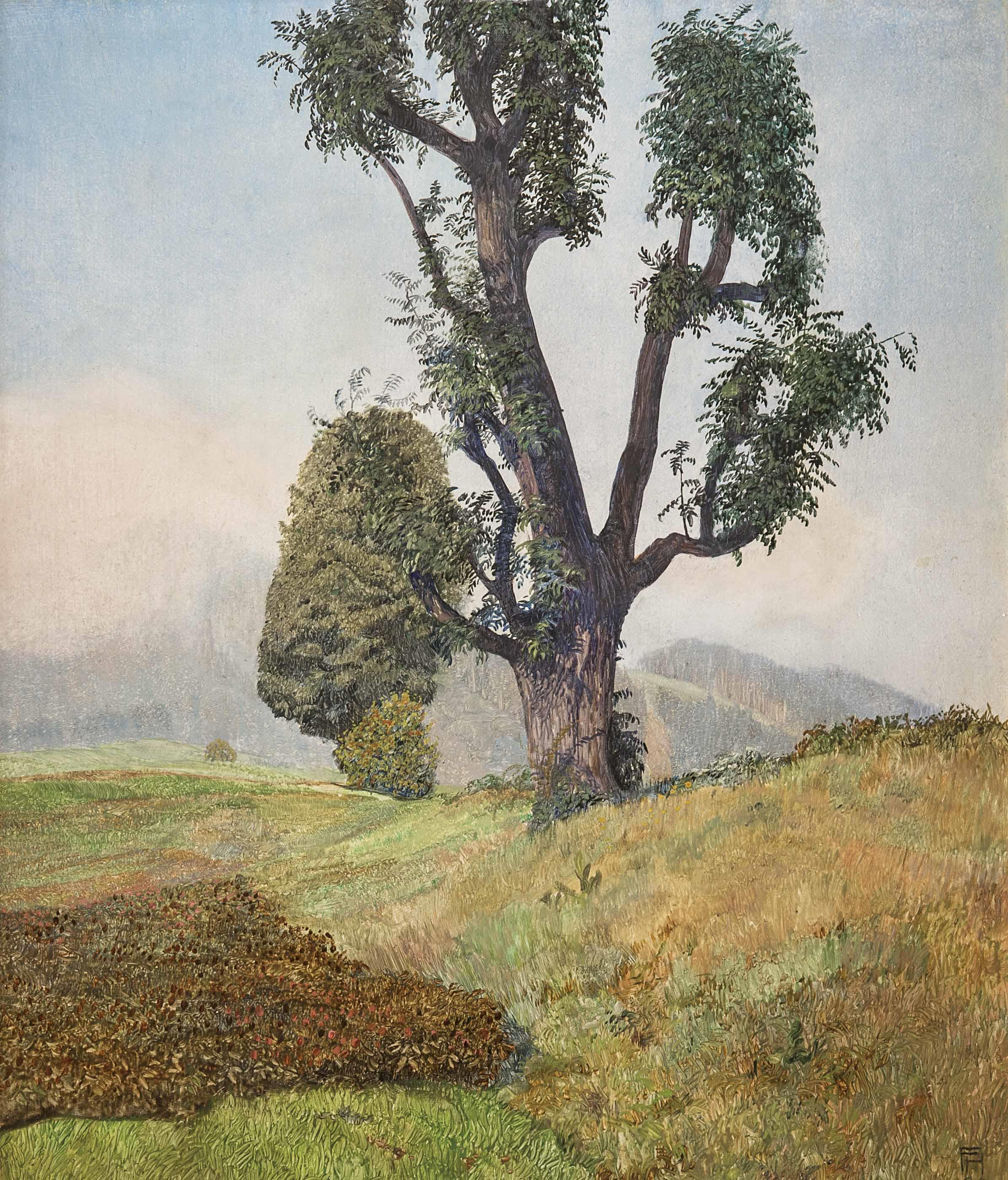 Eschenbaumgruppe auf Feld, monogrammiert und datiert unten rechts: F. H. (19)09, Öl auf Holz, ca. 30 x 26 cm